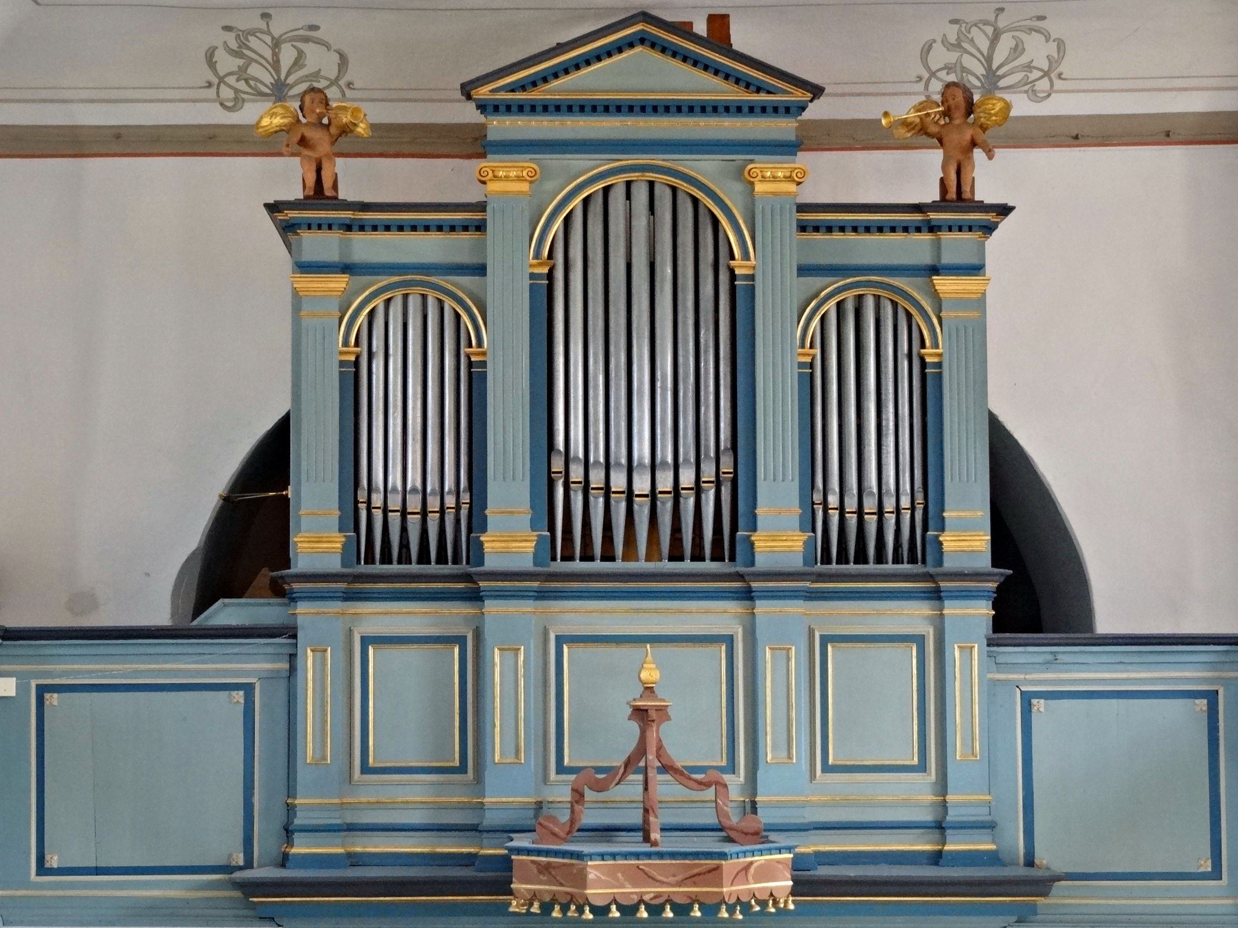 Ev. Kirche Rödgen (Gießen) Orgel